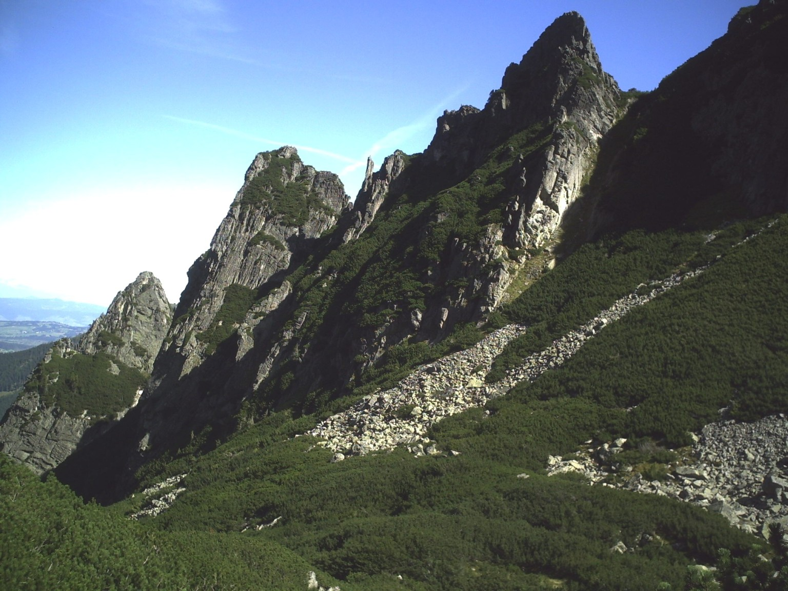 Widok turni Skoruśniaka z nad progu Niżnego Żabiego Stawu Białczańskiego (biełovodskiego).My own work.2006.Suwaj Władysław